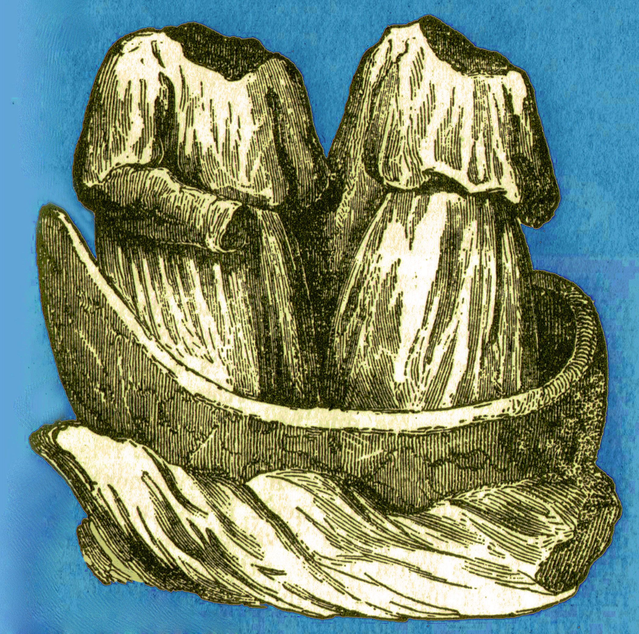 Marie Jacobé et Marie Salomé représentées sans tête dans leur barque de l'église des Saintes-Maries-de-la-Mer